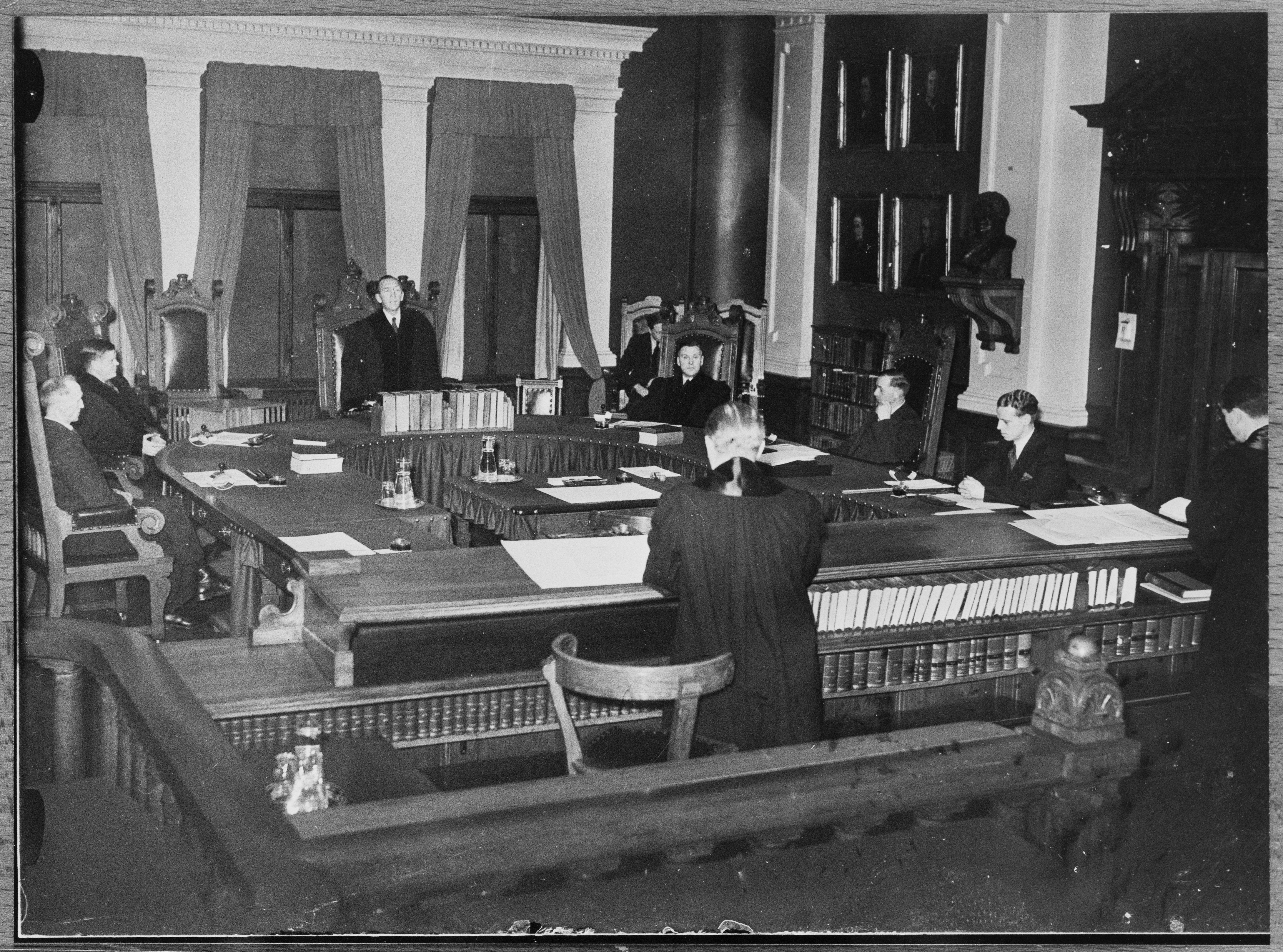 Folkedomstolens første møte (Original bildetekst) Et tilsvarende bilde er gjengitt i Aftenposten onsdag aften 12. februar 1941 med bildeteksten «Lagmannen ved Folkedomstolen Aalvik Pedersen taler.»